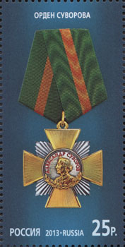 Государственные награды Российской Федерации